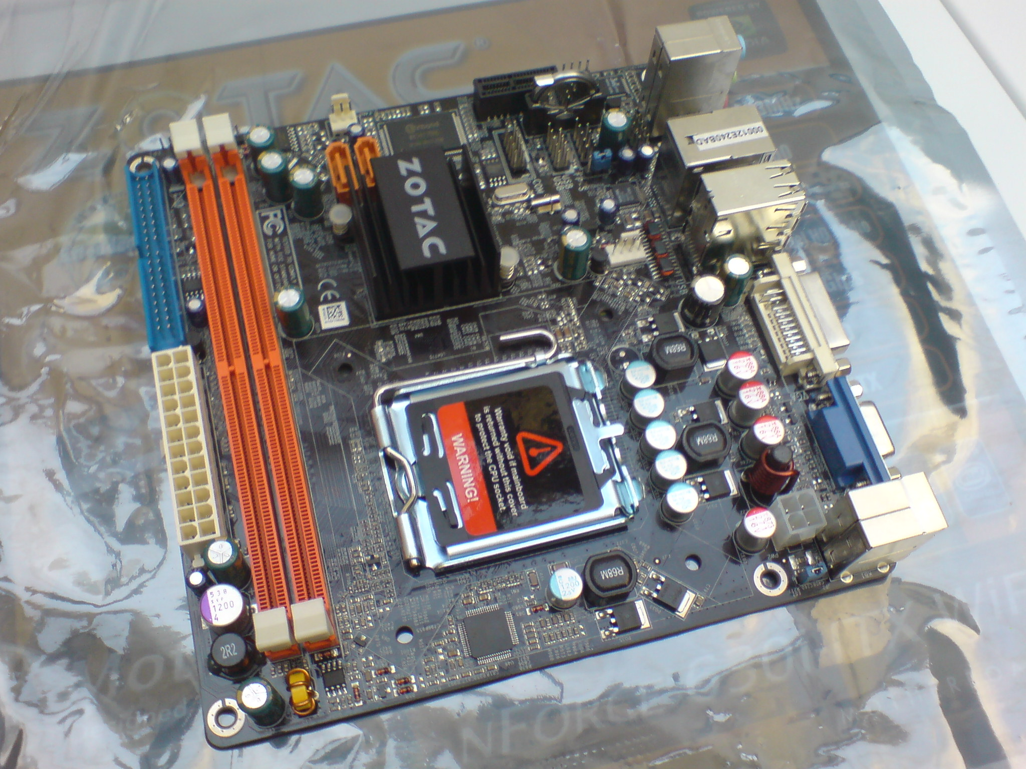 Vista de la Motherboard